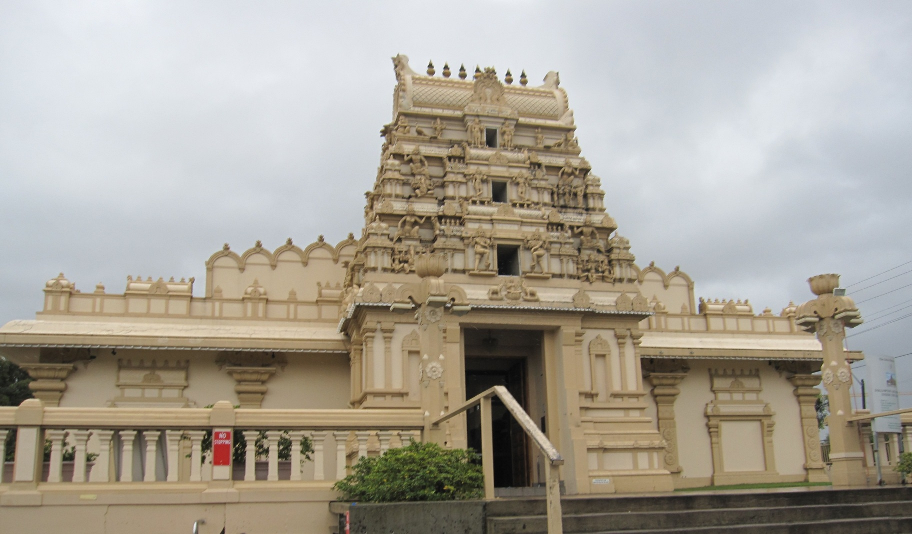 சிட்னி முருகன் கோயில்